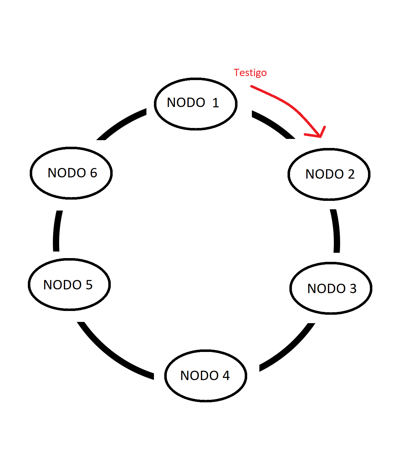 Imagen que describe el algoritmo de anillo para la exclusión mutua en sistemas distribuidos